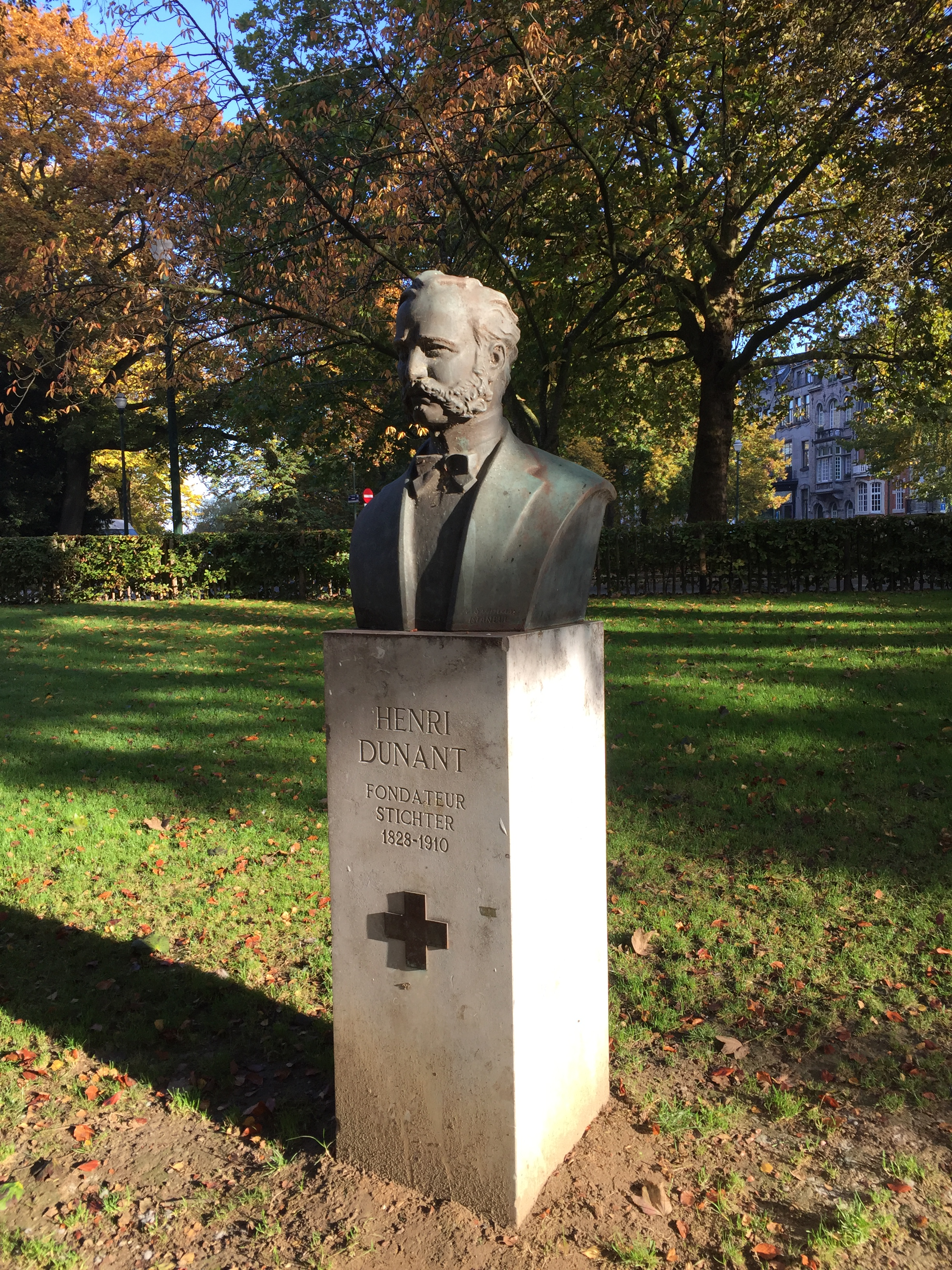 Buste de Henri Dunant (1828-1910) fondateur de la Croix-Rouge. Par Nurset Suman né en 1907, inauguré le 17 juin 1978. Square de la Croix-Rouge à Ixelles.